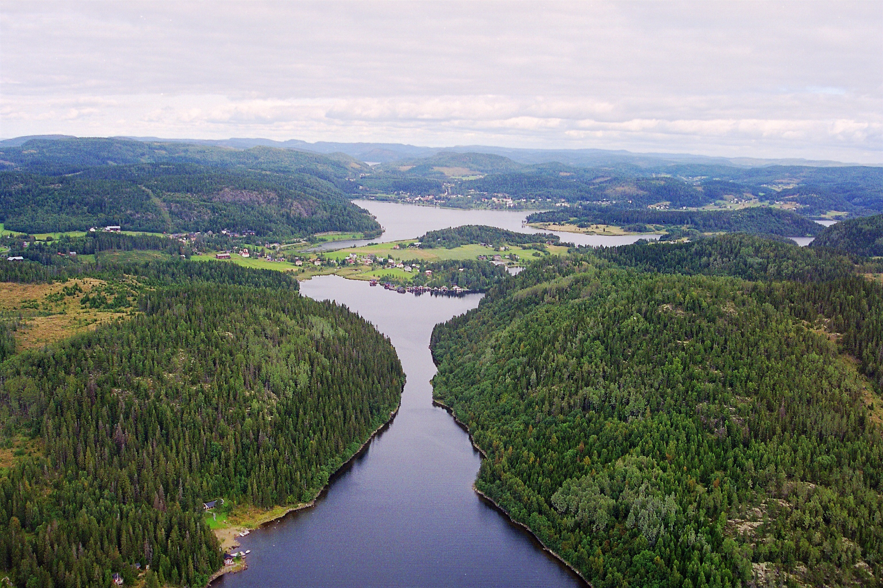 Vy över Häggvik med den avsnörda Vågsfjärden vid Nordingrå i bakgrunden.